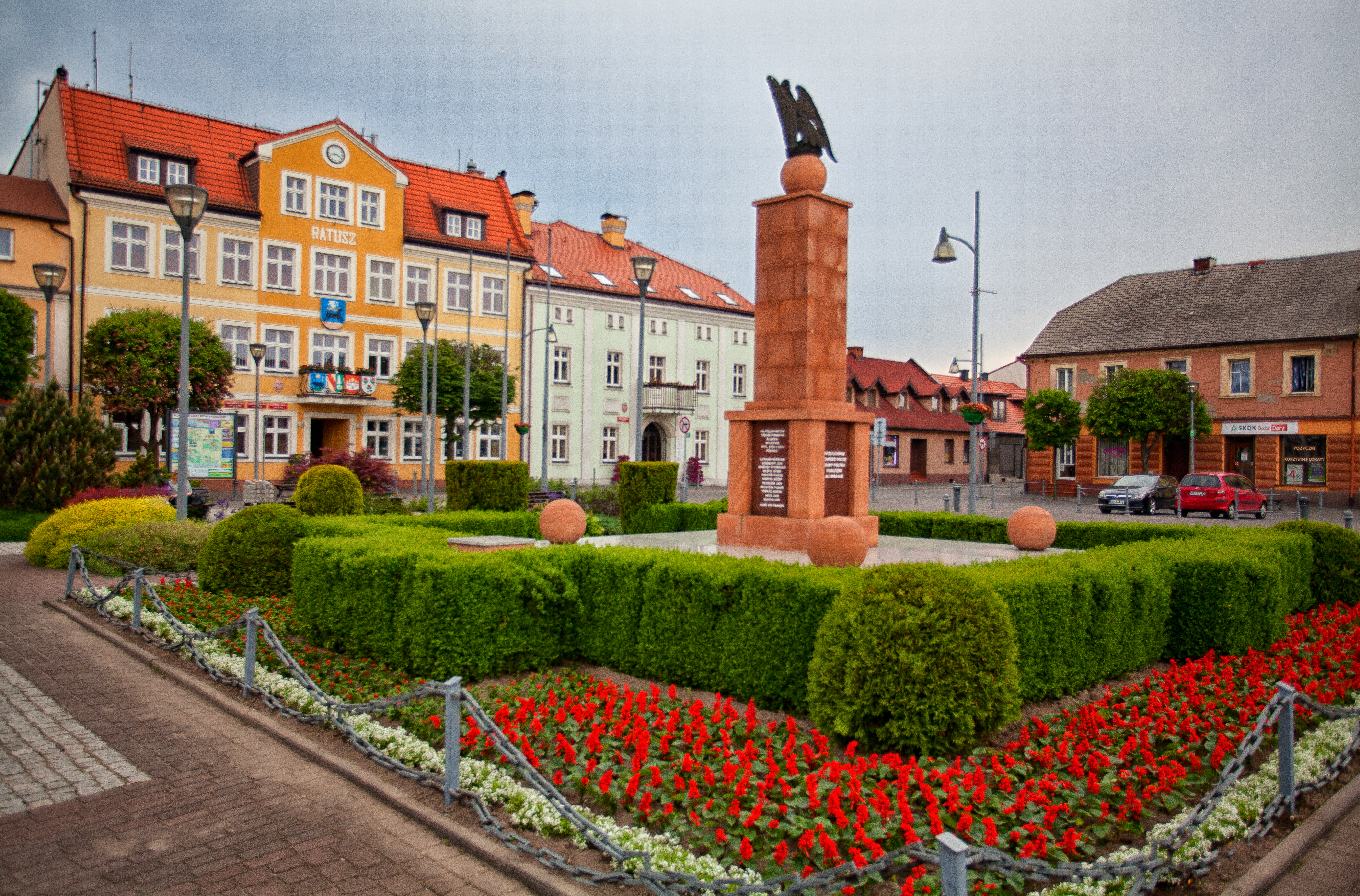 gmina Bieruń, rynek